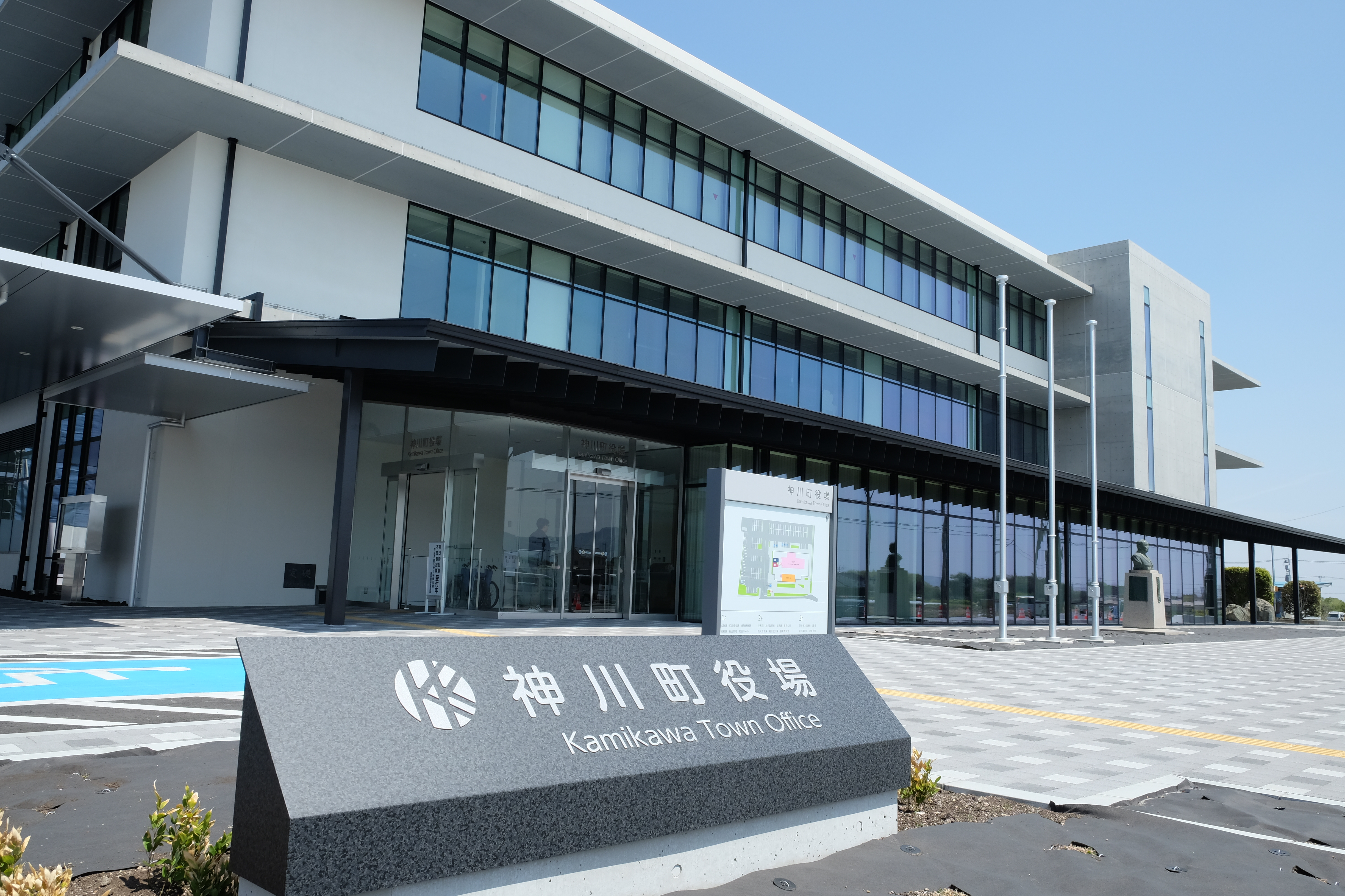 埼玉県児玉郡神川町役場庁舎（2019年竣工）